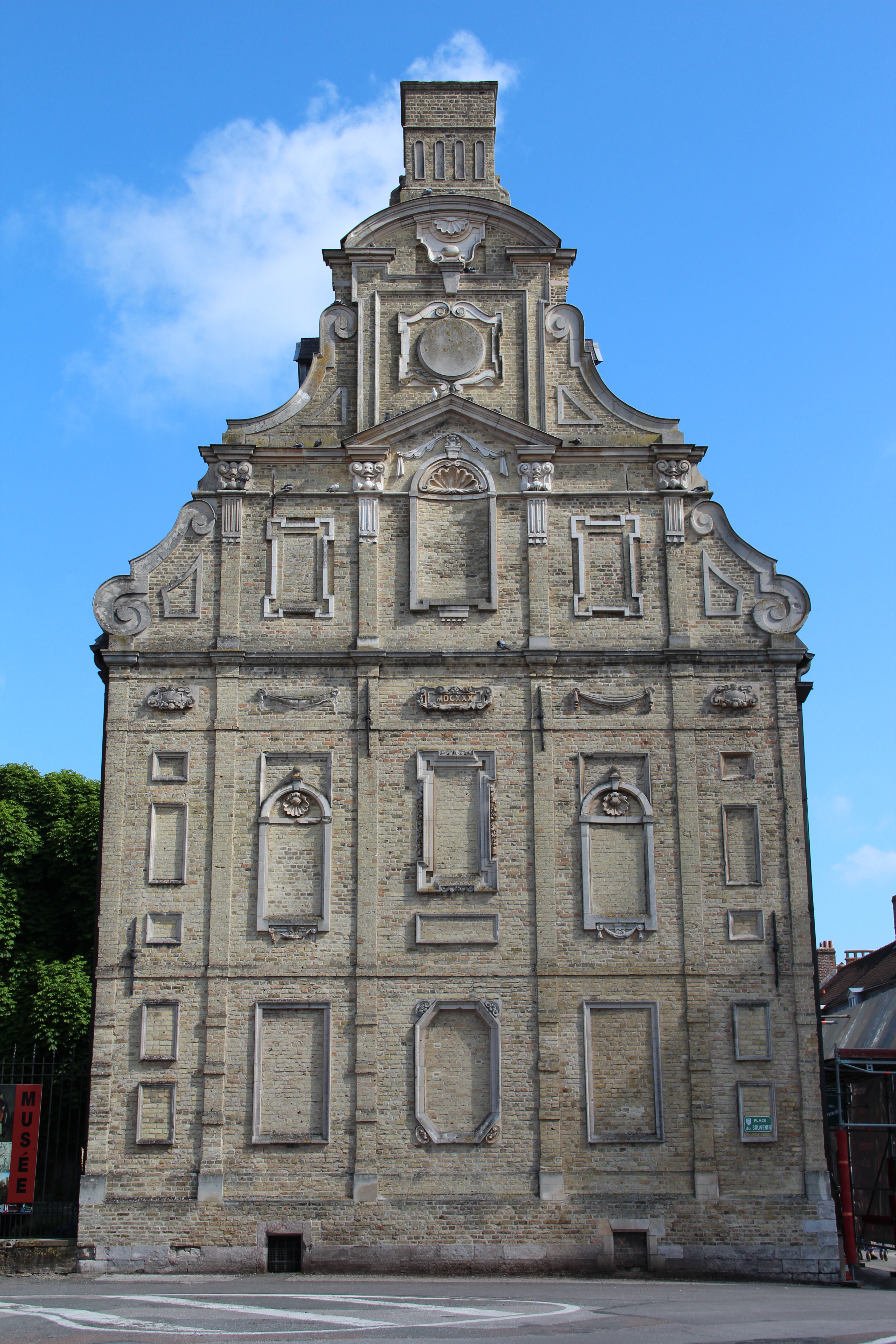 L'ancien mont de piété dessiné par Wenceslas Cobergher (1629) et actuel musée municipal de Bergues (Nord, France).